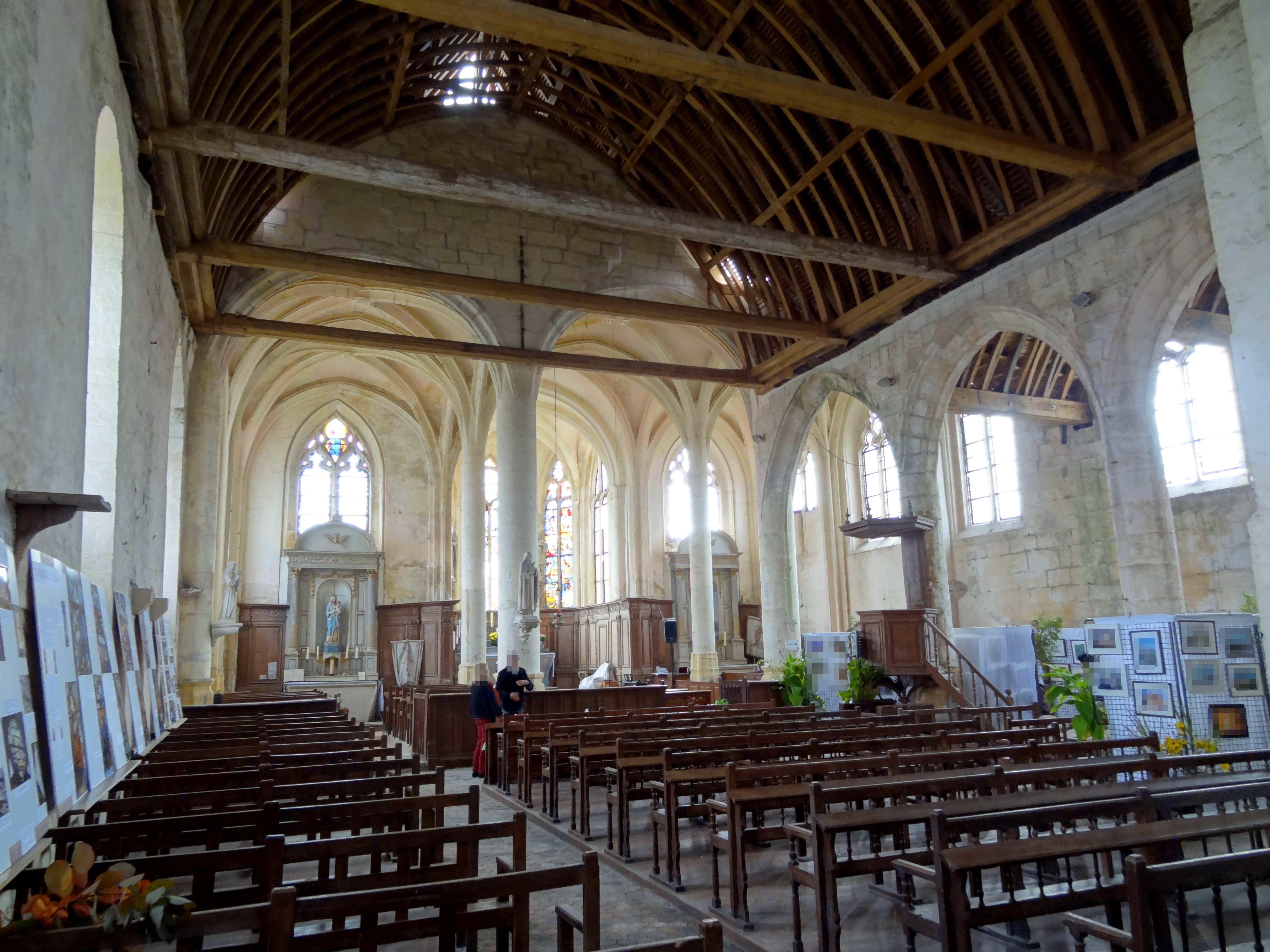 Intérieur de l'église - voir titre.